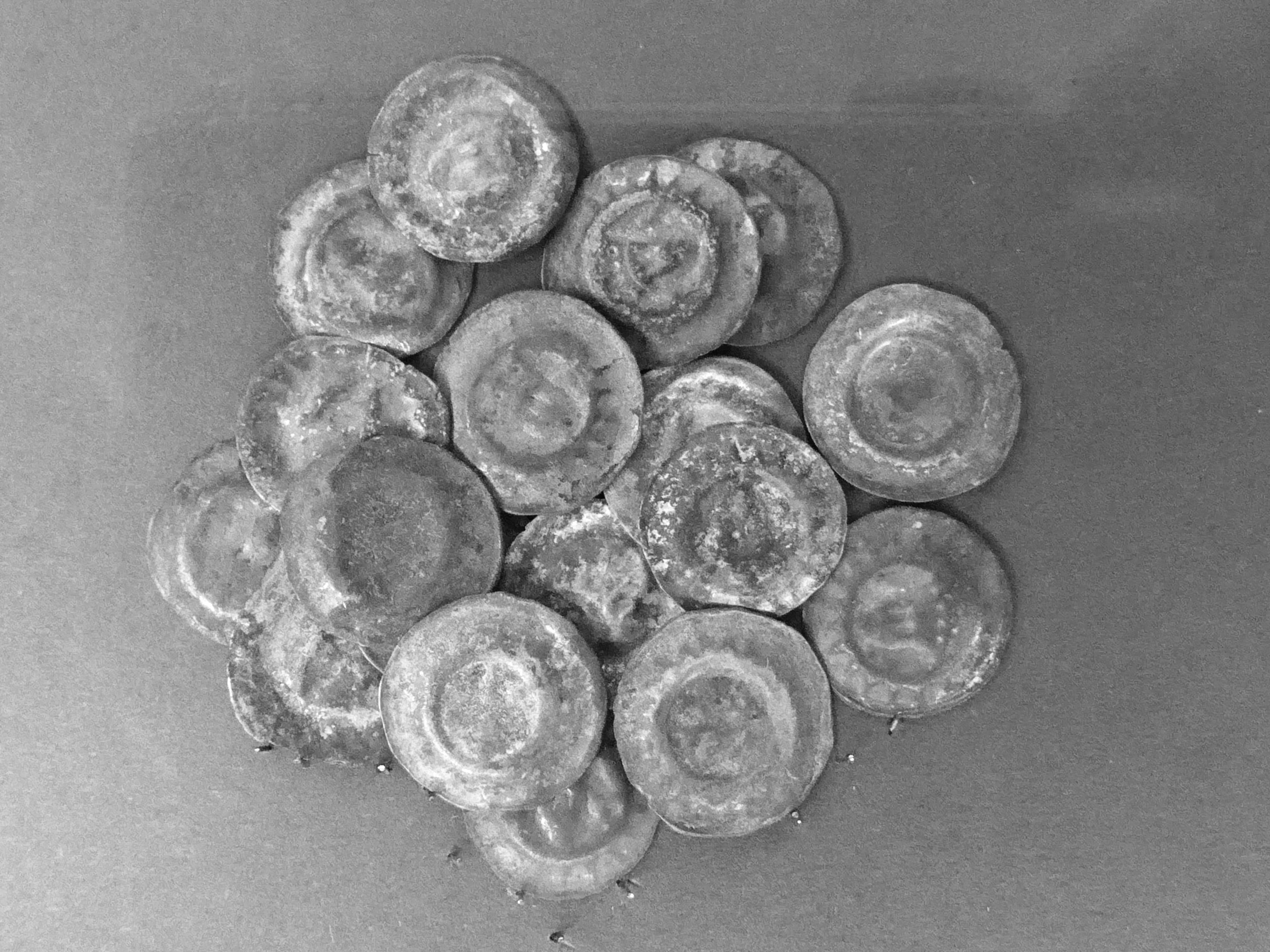 Lübecker Brakteaten (einseitig geprägte Silbermünzen) aus dem "Bremer Fund" von 1887. Vergraben vor 1404. Focke-Museum Bremen, Teil von Inv.Nr. 1999.390. Da die Originalaufnahme die Korrosionsschichten des Silbers als "goldenen" Glanz widergibt, wurde das Foto s/w hochgeladen, um Missverständnisse zu vermeiden.